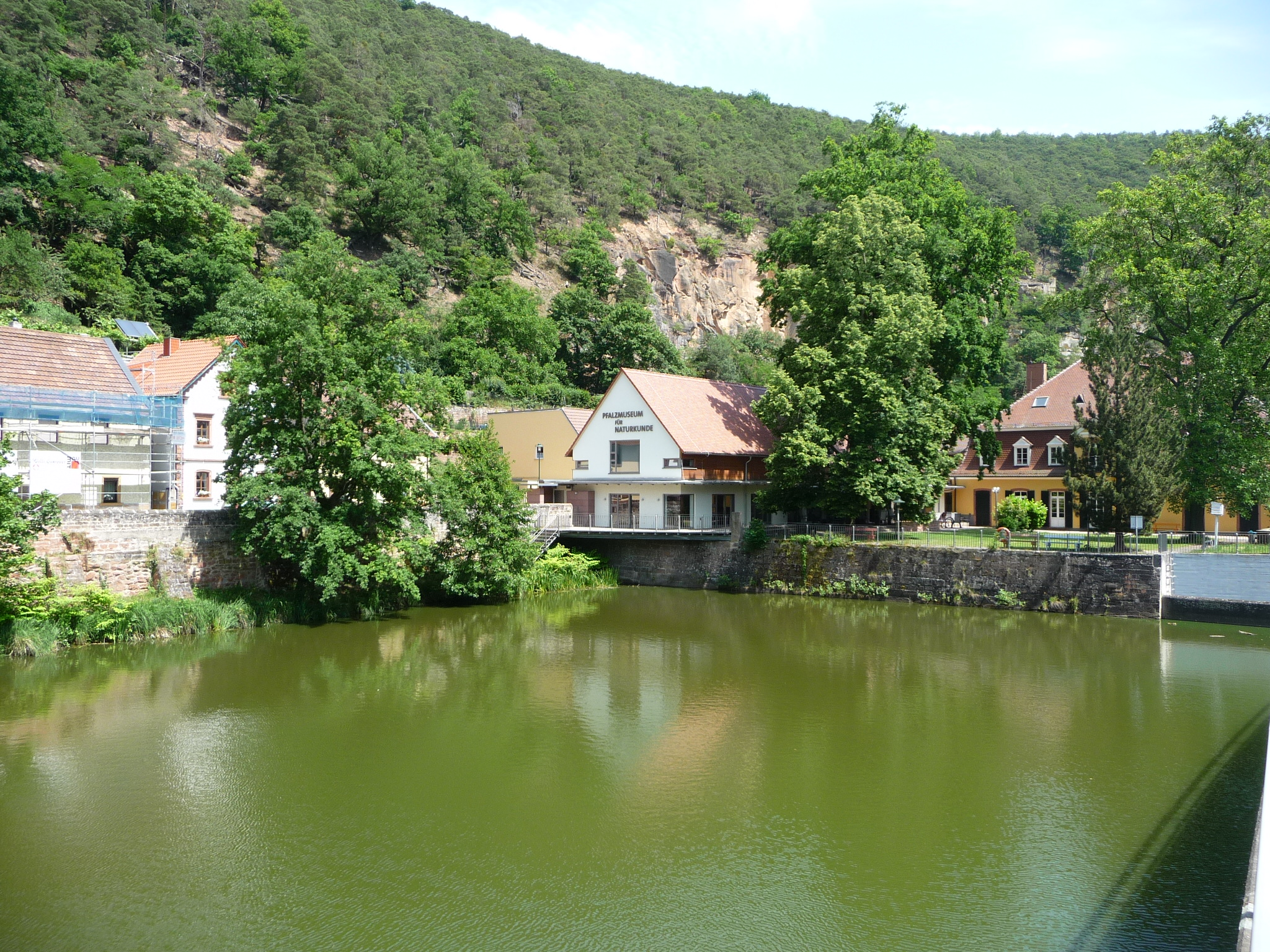 Herzogweiher